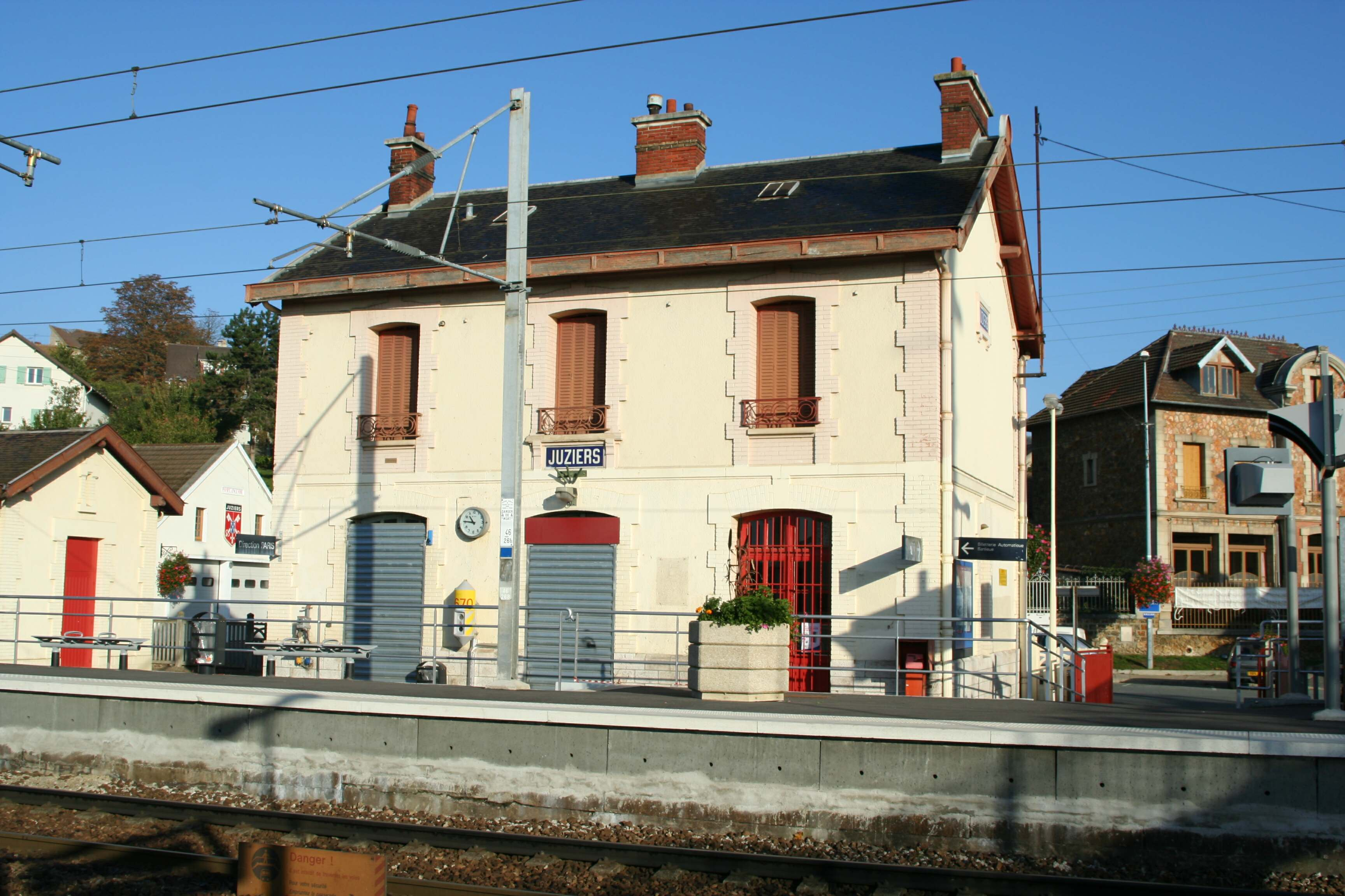 Gare de Juziers - Yvelines (France)